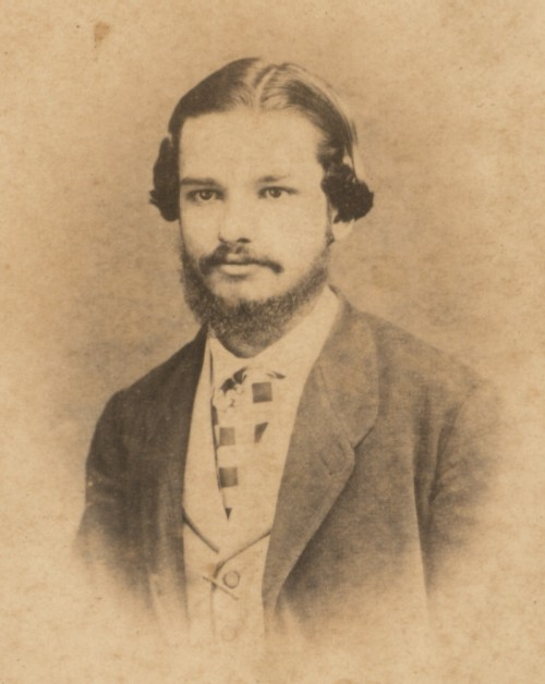 Deocleciano Pires Teixeira (em 1 de outubro de 1865), pai de Anísio Teixeira.